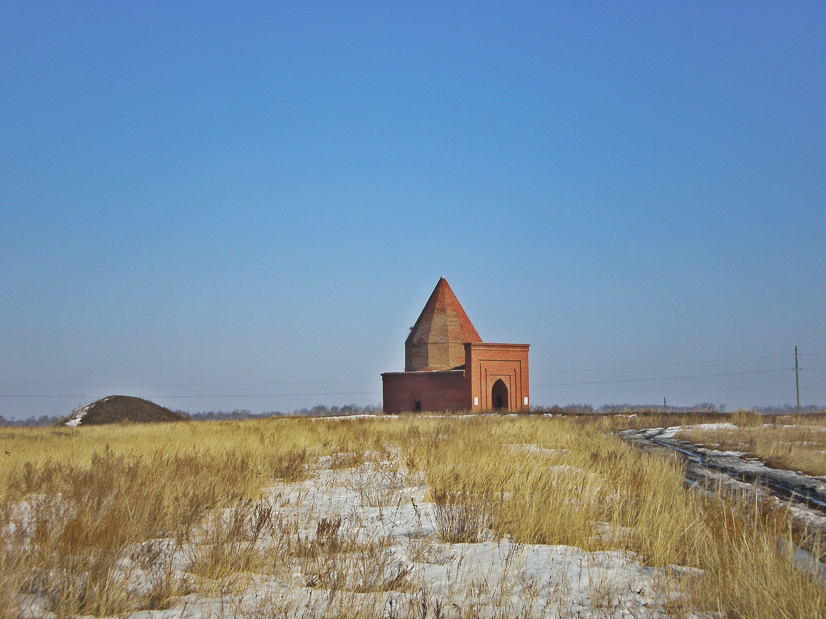 Урочище Кесене, Варненский район This image is related to the protected area of Russia number 7410060